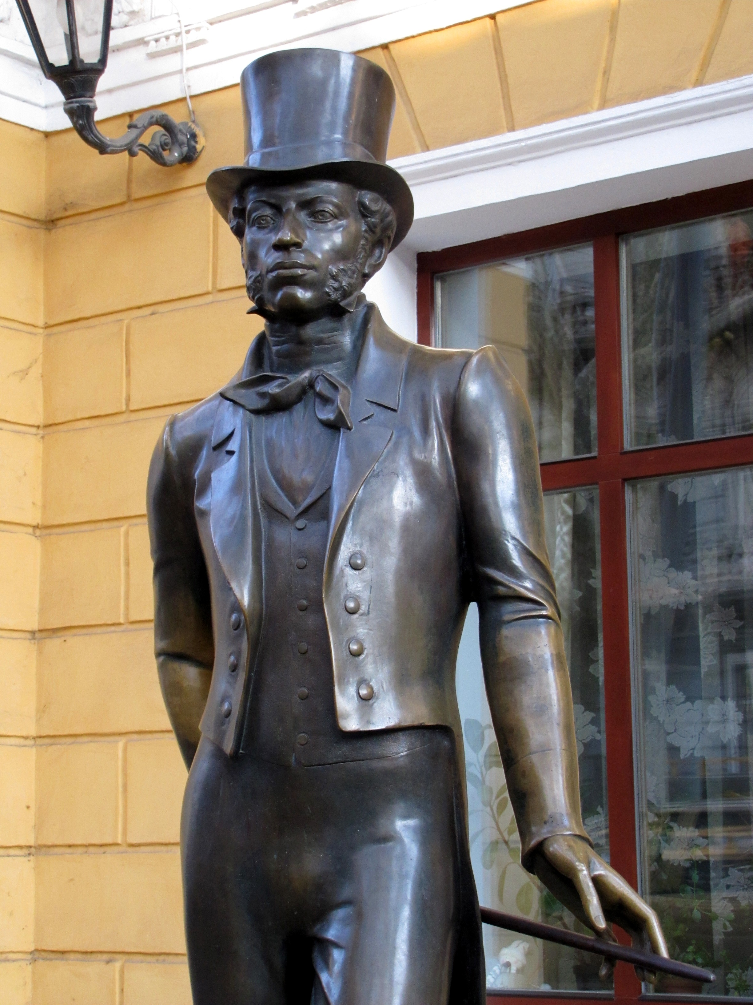 Socha Alexandra Puškina před Puškinovým muzeem v Oděse. Sochu zhotovil oděský sochař Alexander Tokarev a byla odhalena v roce 1999 při příležitosti 200. výročí narození Puškina. Je zobrazen jako 24letý muž v životní velikosti, který v roce 1823 přijel na několik měsíců do Oděsy.